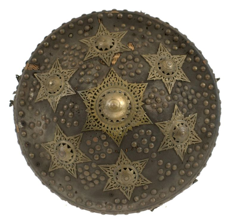 Schild. Rotan schild met katoen overtrokken Unknown language: Perisai